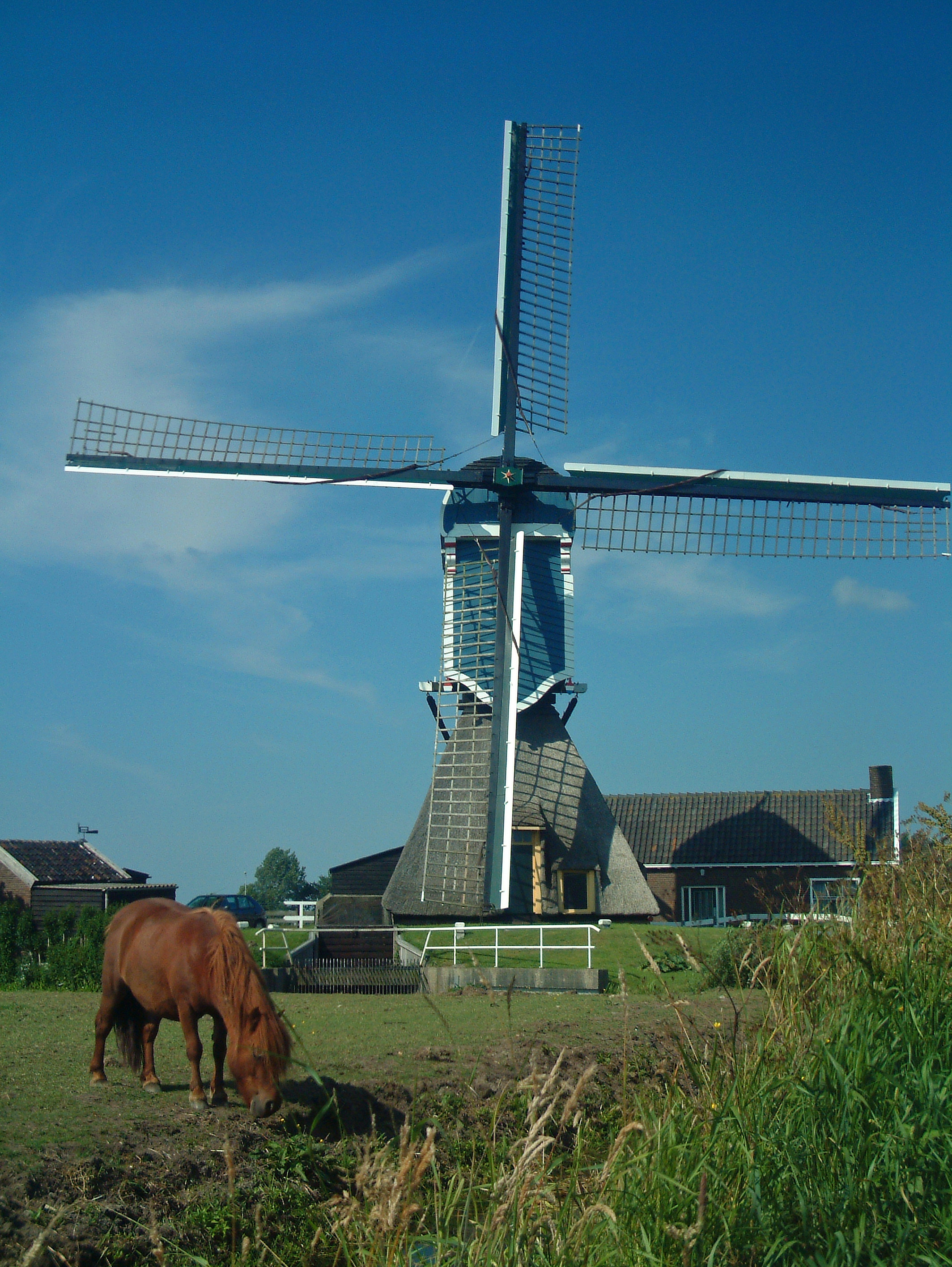 Plaats Zoeterwoude-Rijndijk Bouwjaar 1626 / 1975 Type wipmolen Functie poldermolen